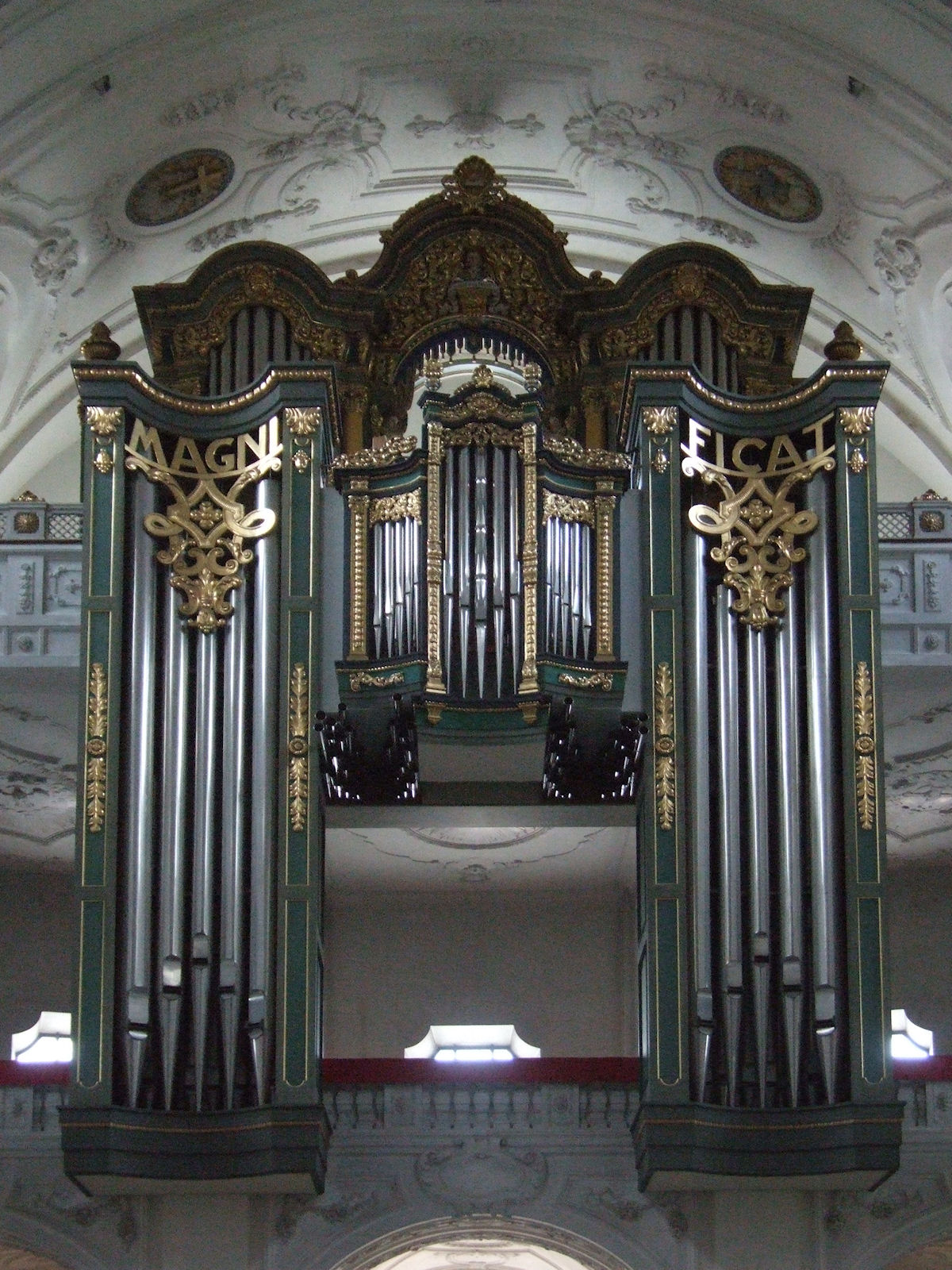 Organ, Basilika Sankt Anna, Altötting, Bavaria, Germany